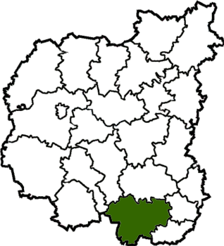 Prylutskyi-Raion map